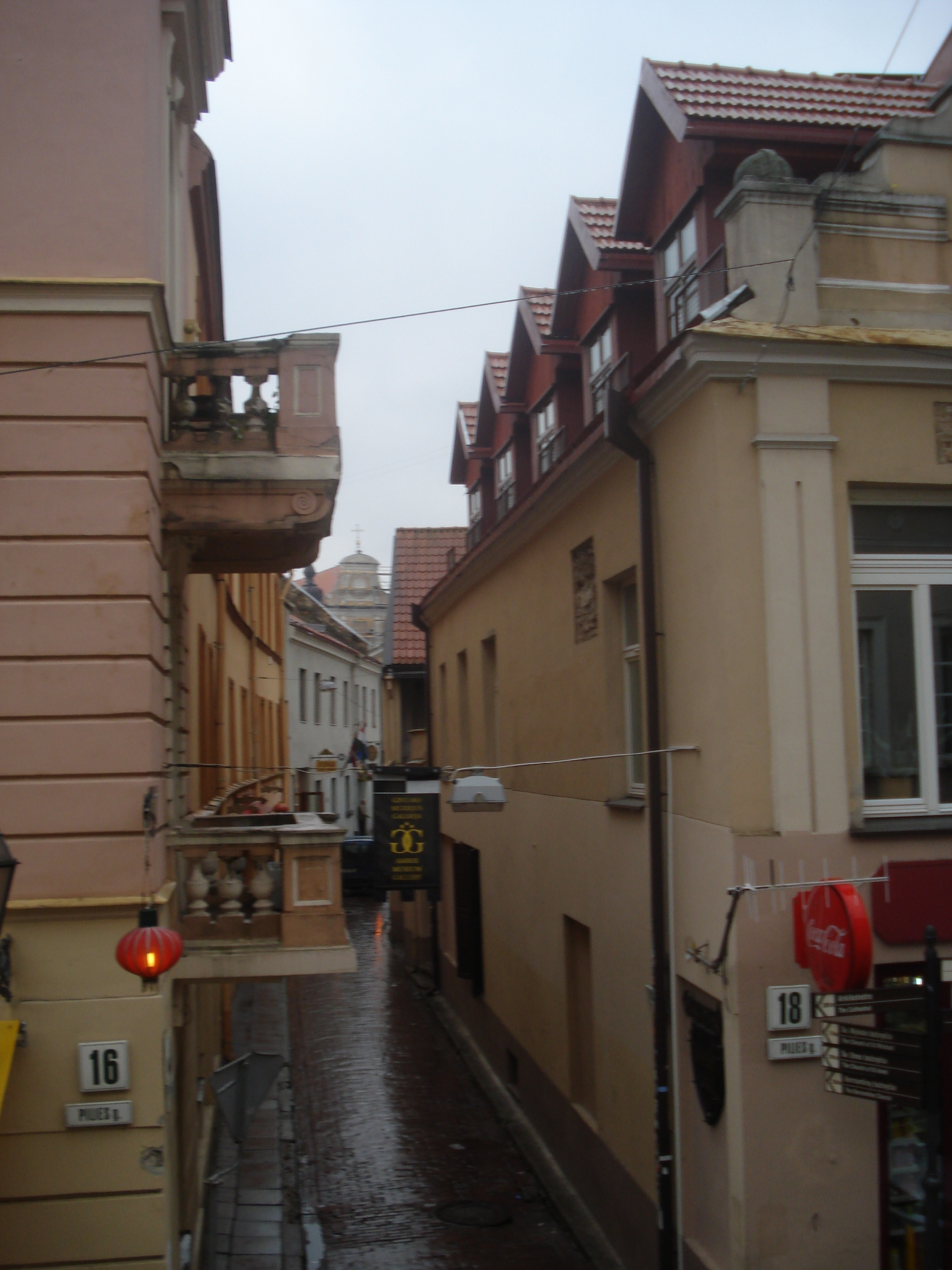 Švento Mykolo gatvė (former J. Biliūno g., Св. Михалский переулок) in Vilnius. Pilies g. 16, Pilies g. 18